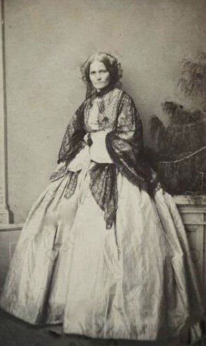 Louise von Senarclens-Grancy, nee de Otting-Fünfstetten (24.05.1810-18.05.1876)